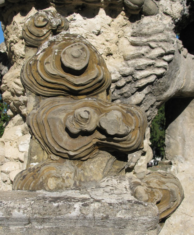 Palais du facteur Cheval - Pierre dite "pierre d'achoppement", trouvée par le facteur en 1879 et premier élément de sa collection. Il l'a placée sur la terrasse du palais, tournée vers l'ouest